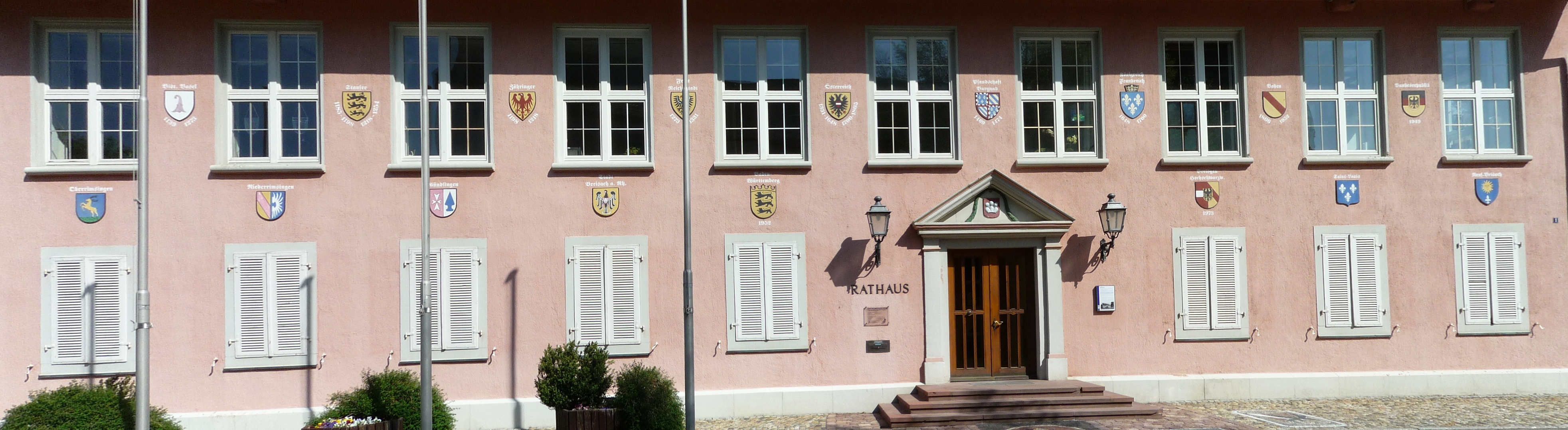 Wappen am Breisacher Rathaus oben: Bistum Basel, Staufer, Zähringer, Freie Reichtsstadt, Österreich, Pfandschaft Burgund, Königreich Frankreich, Baden, Bundesrepublik unten: Oberrimsingen, Niederrimsingen, Gündlingen, Stadt Breisach am Rhein, Baden-Württemberg, Breisgau-Hochschwarzwald, Saint-Louis, Neuf-Brisach